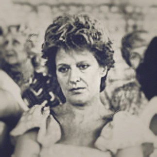 Tina Serrano en una escena de la película Chechechela, una chica de barrio (1986).